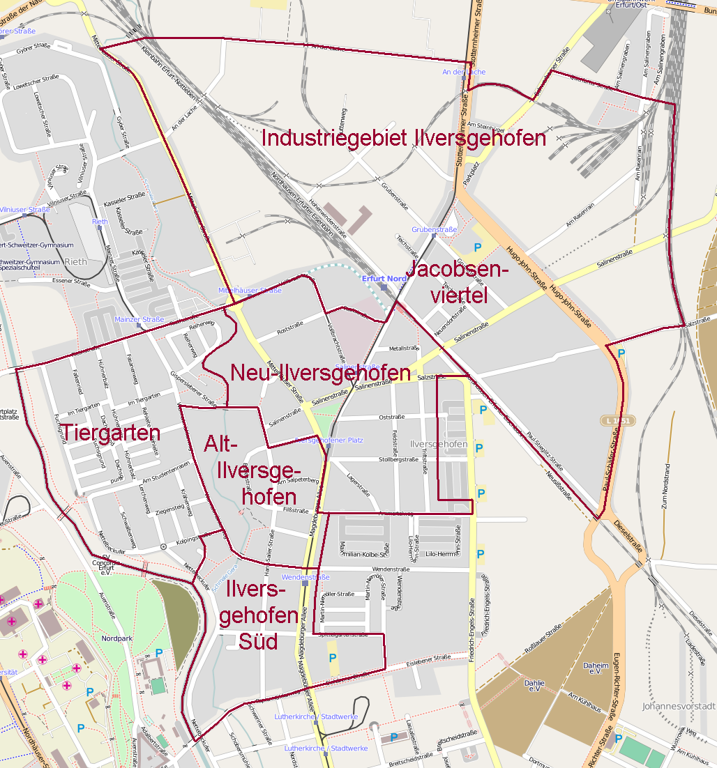 Eine Karte der Viertel im Stadtteil Ilversgehofen von Erfurt.